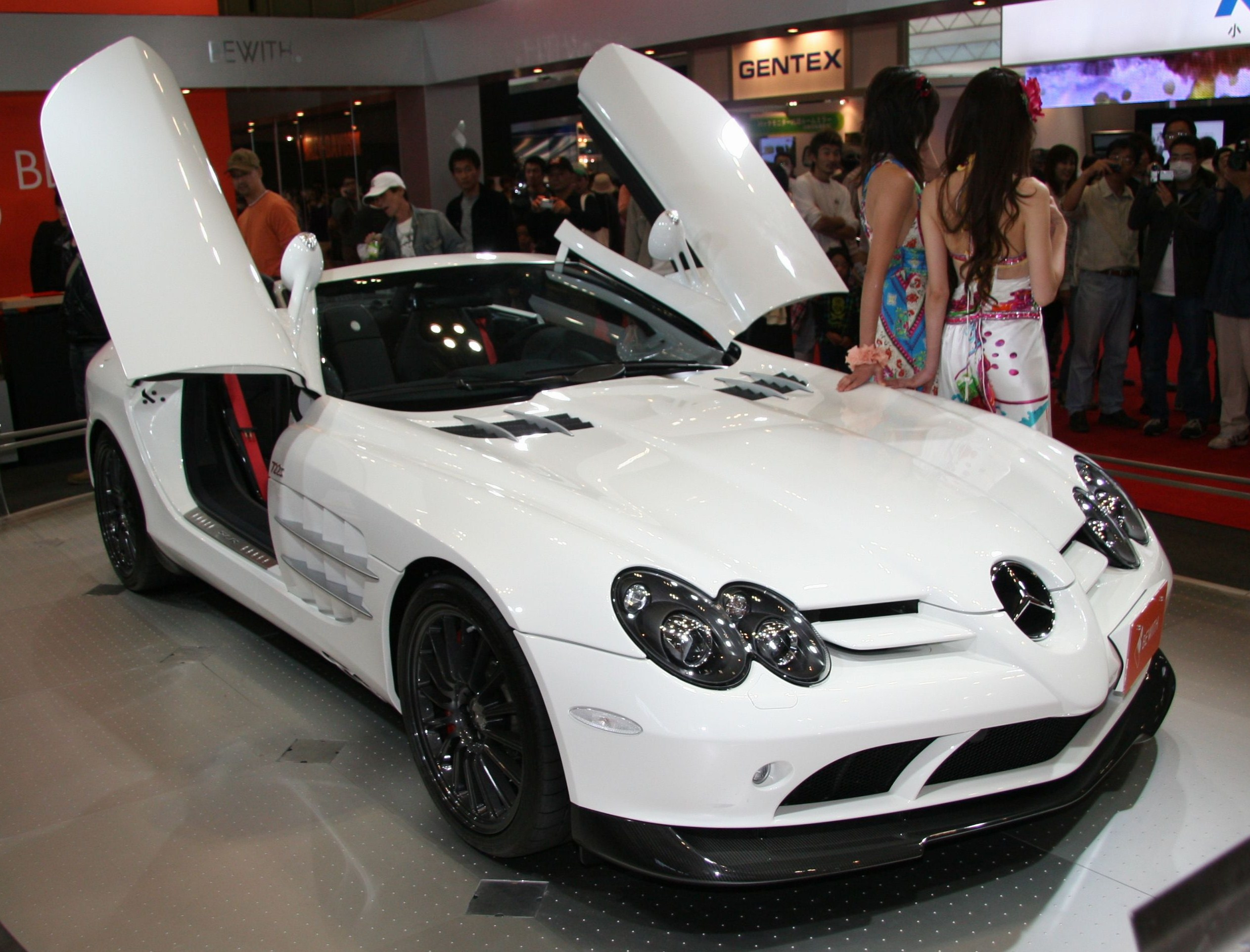 Mercedes-Benz SLR McLaren